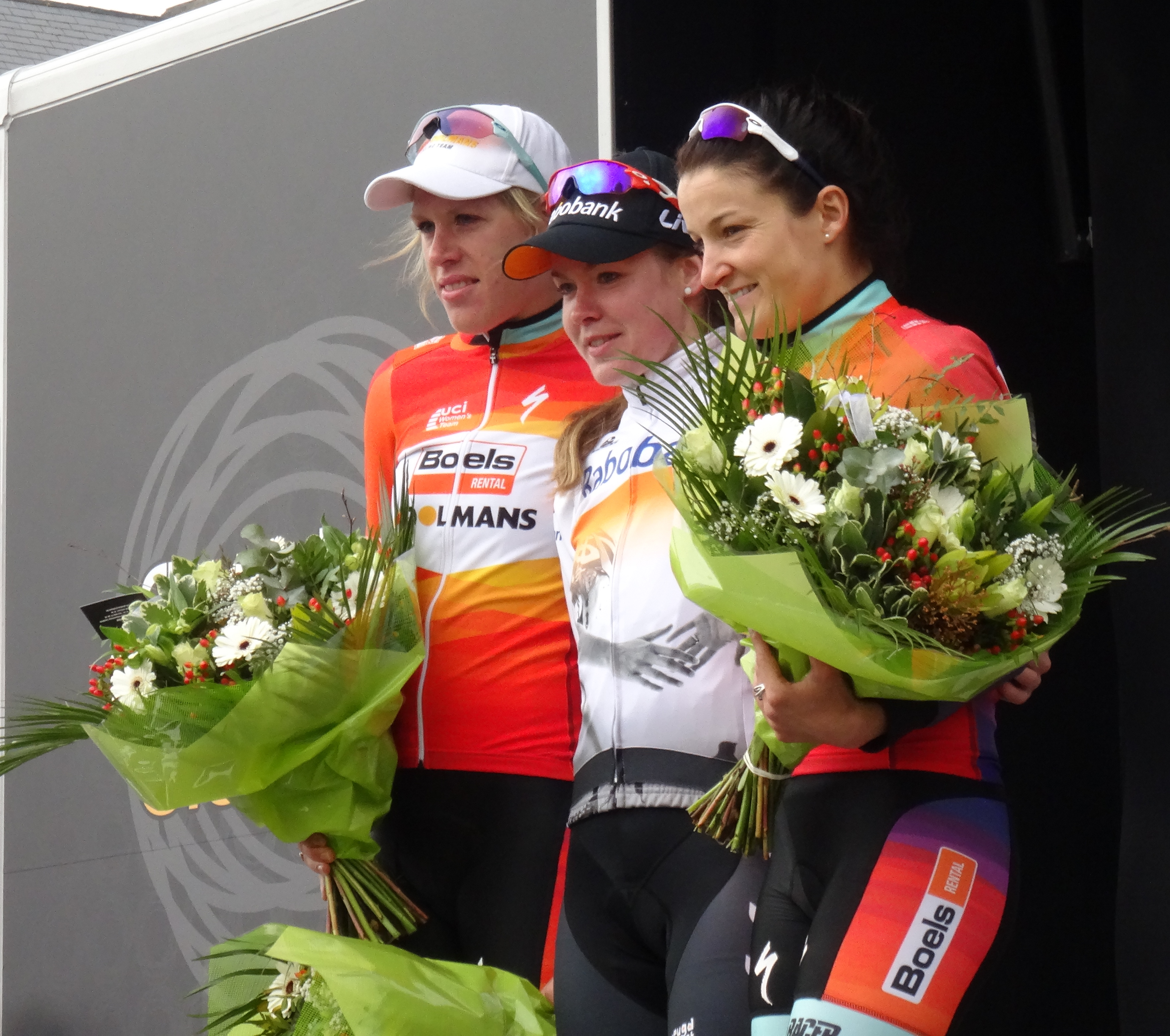 Reportage réalisé le samedi 28 février à l'occasion du départ et de l'arrivée du Circuit Het Nieuwsblad 2015 à Gand, Belgique.